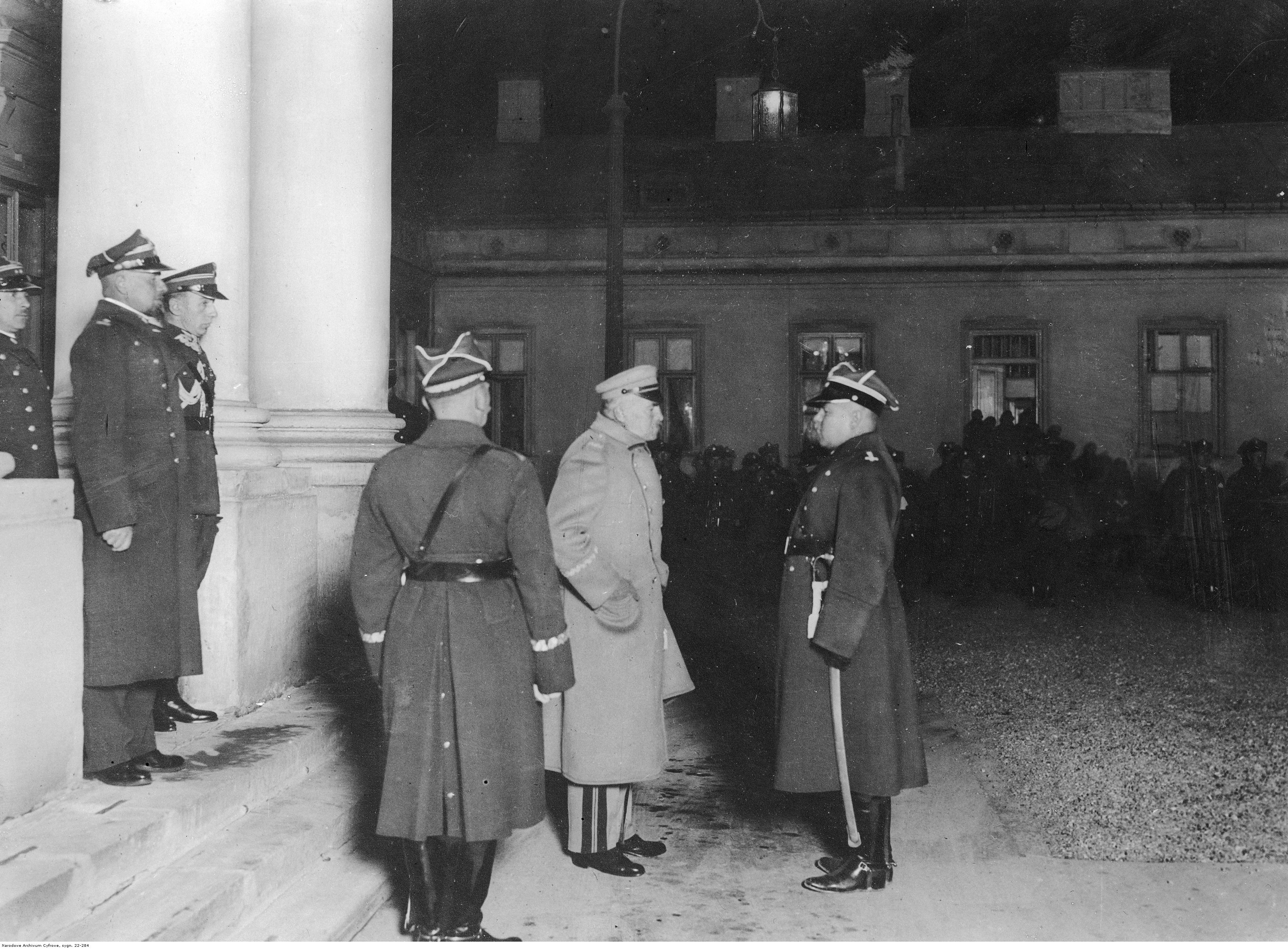 Pułkownik Leon Dunin-Wolski składa meldunek marszałkowi Piłsudskiemu. Widoczny także m.in. ppłk Aleksander Prystor (2. z lewej).